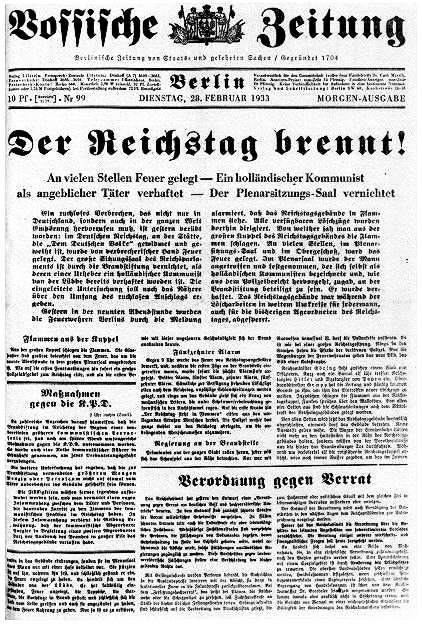 Title-page of the "Vossische Zeitung"